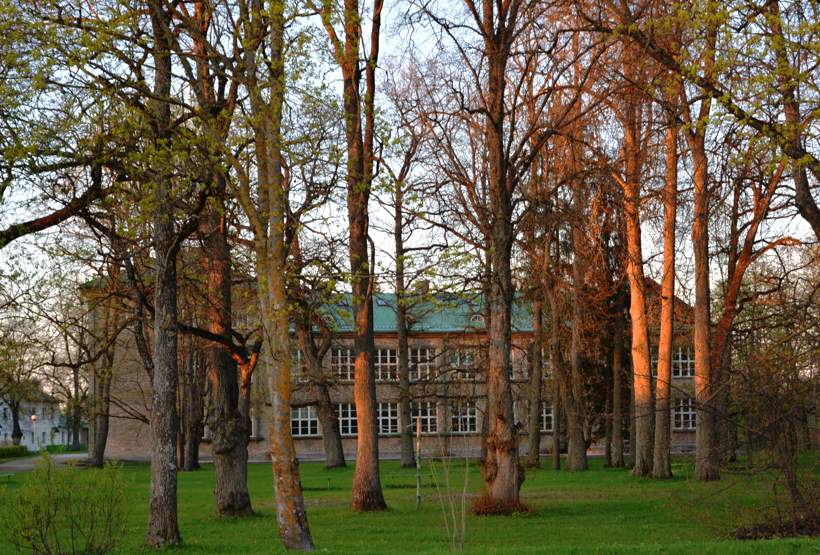 Püssi koolihoone, 1924-26